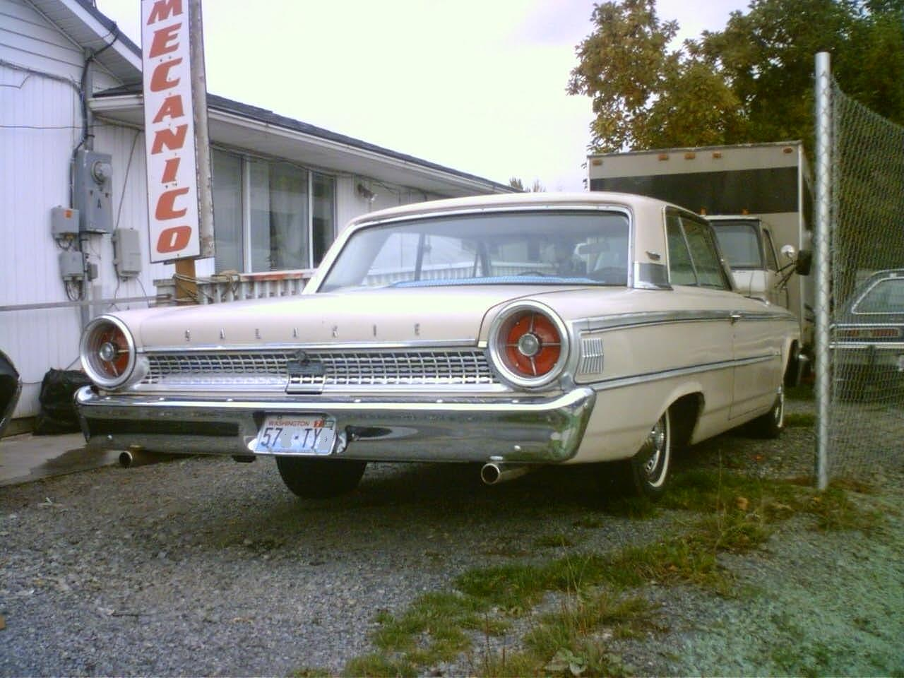 1963 Ford Galaxie taken 2006